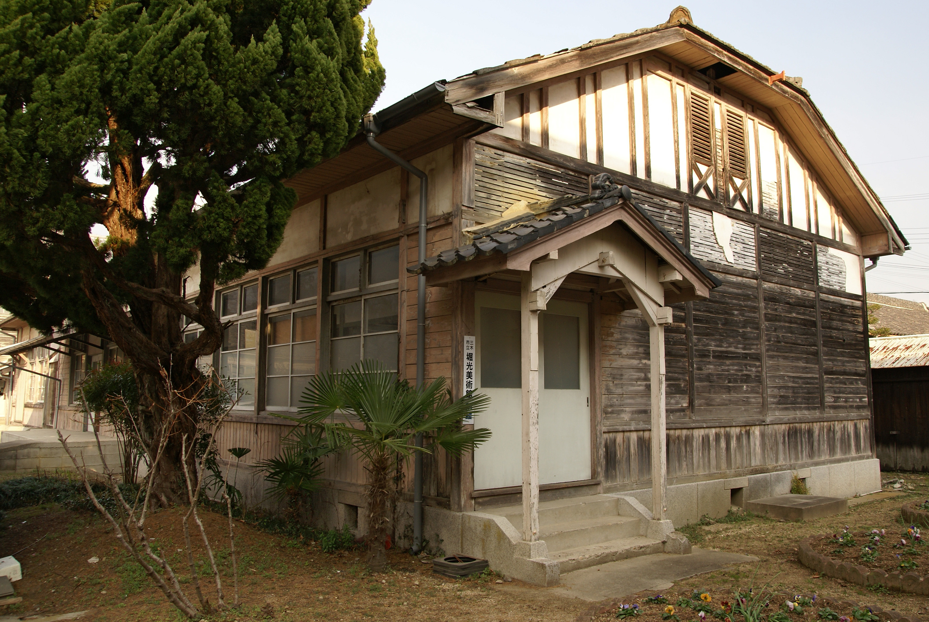 Miki Municipal Horimitsu Museum in Miki, Hyogo prefecture, Japan